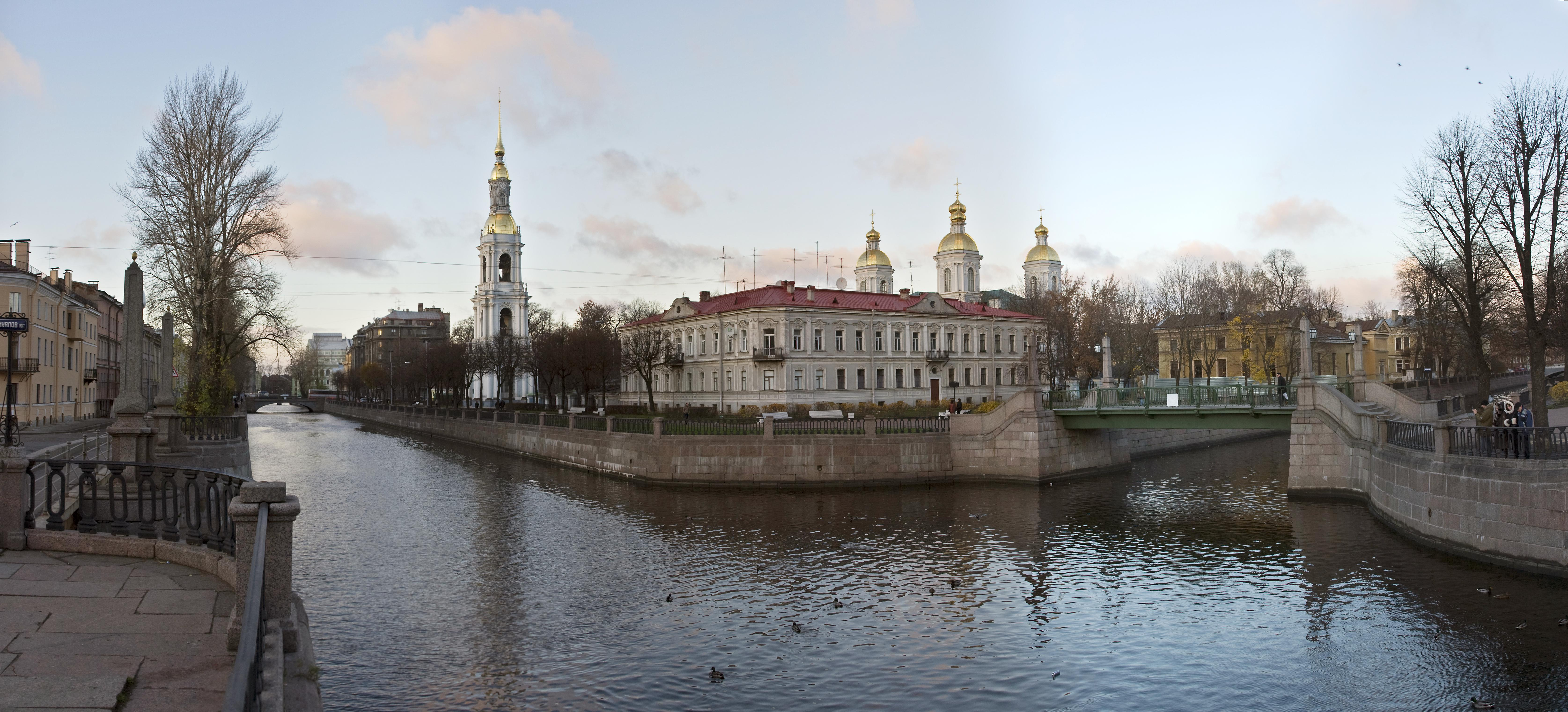 Санкт-Петербург, набережная Крюкова канала. Панорама с видом на Никольский собор и Красногвардейский мост через канал Грибоедова